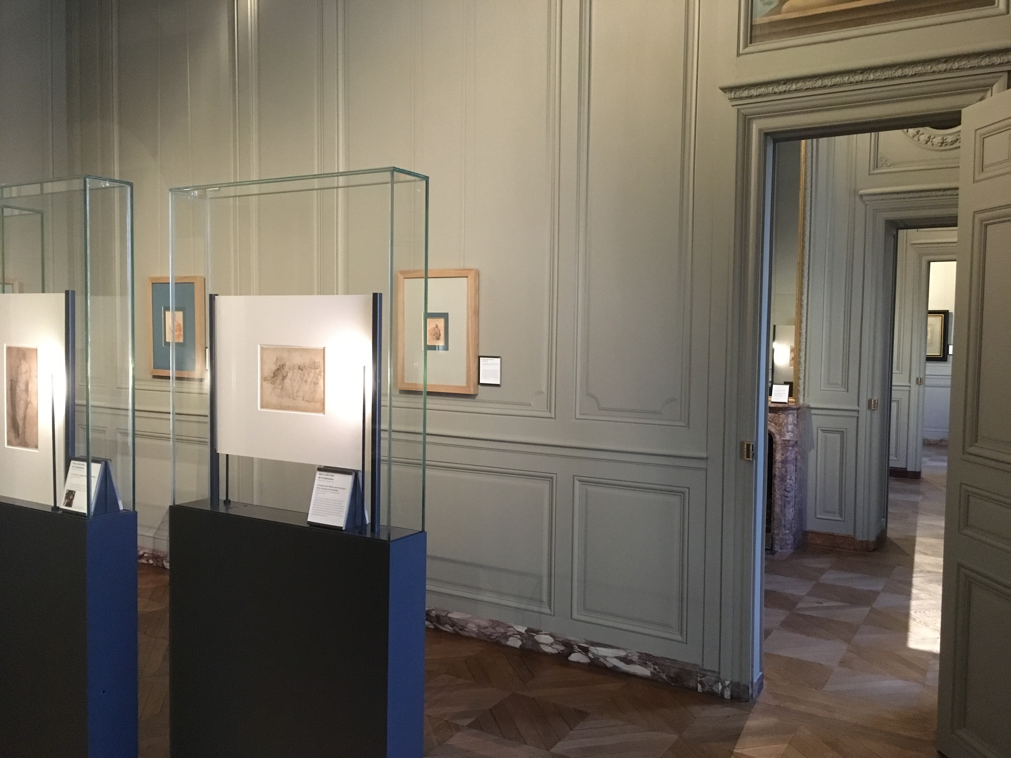 Vue de l'enfilade des pièces du cabinet d'arts graphiques à l'occasion de l'exposition inaugurale "Bellini, Michel-Ange, Le Parmesan". Musée Condé, château de Chantilly.